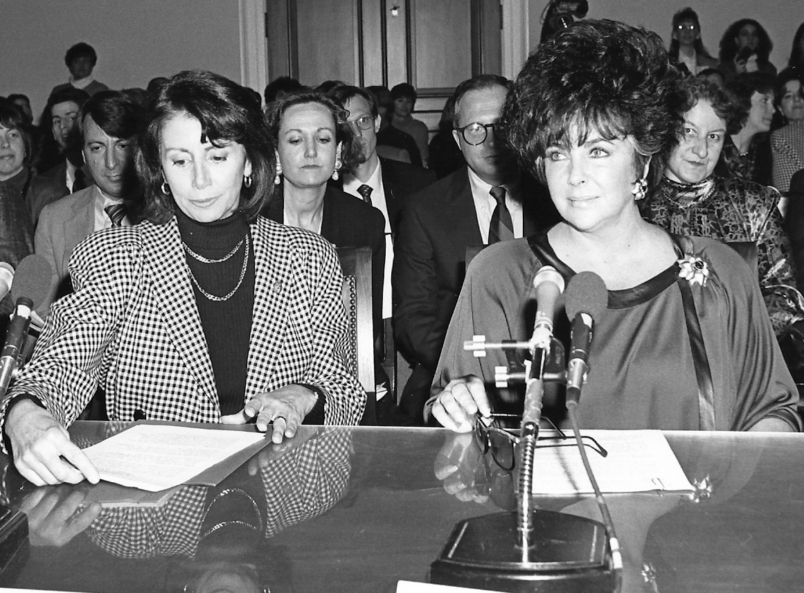 March 6, 1990